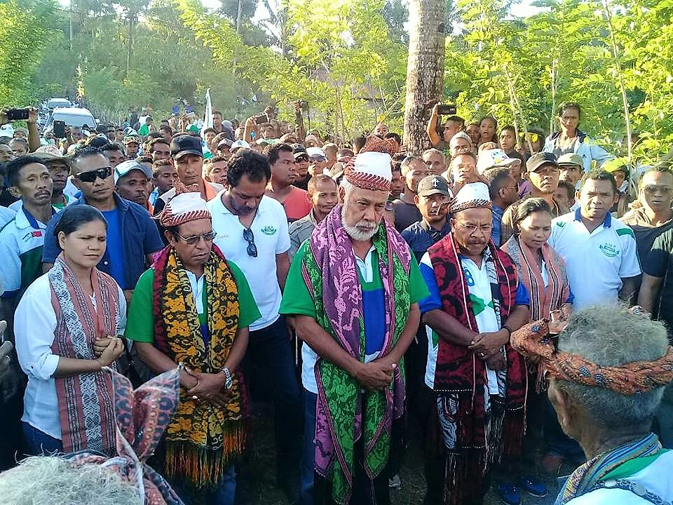 Taur Matan Ruak, Xanana Gusmão und José dos Santos Bucar Wahlkampfveranstaltung der AMP in Oesilo, Oecusse, Osttimor